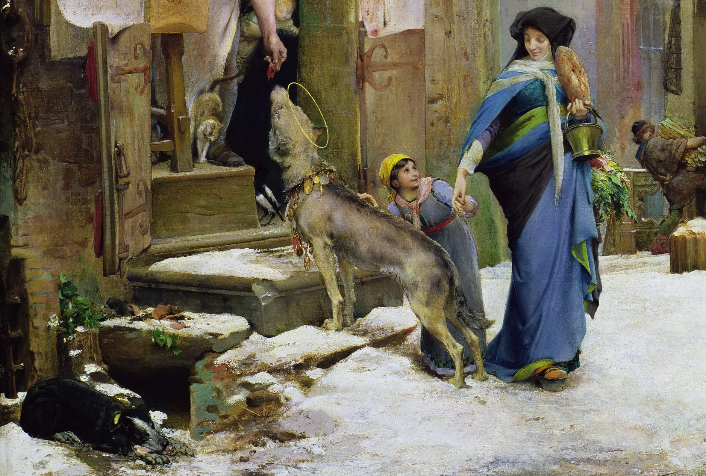 detail